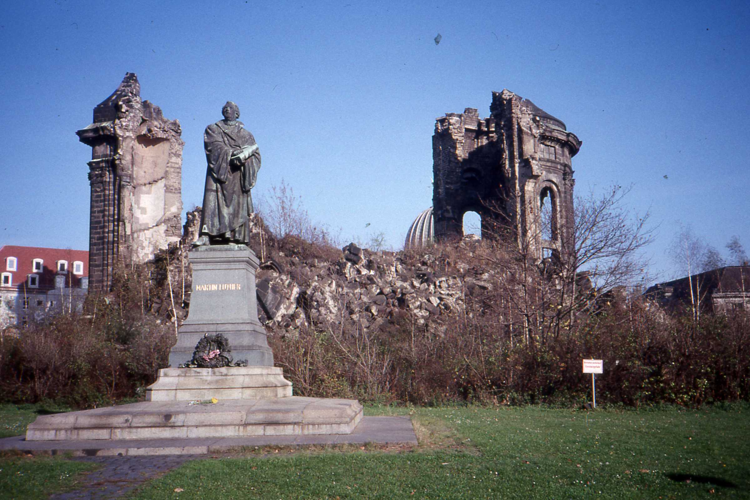 Die Frauenkirche, Dresden. 11. November 1989